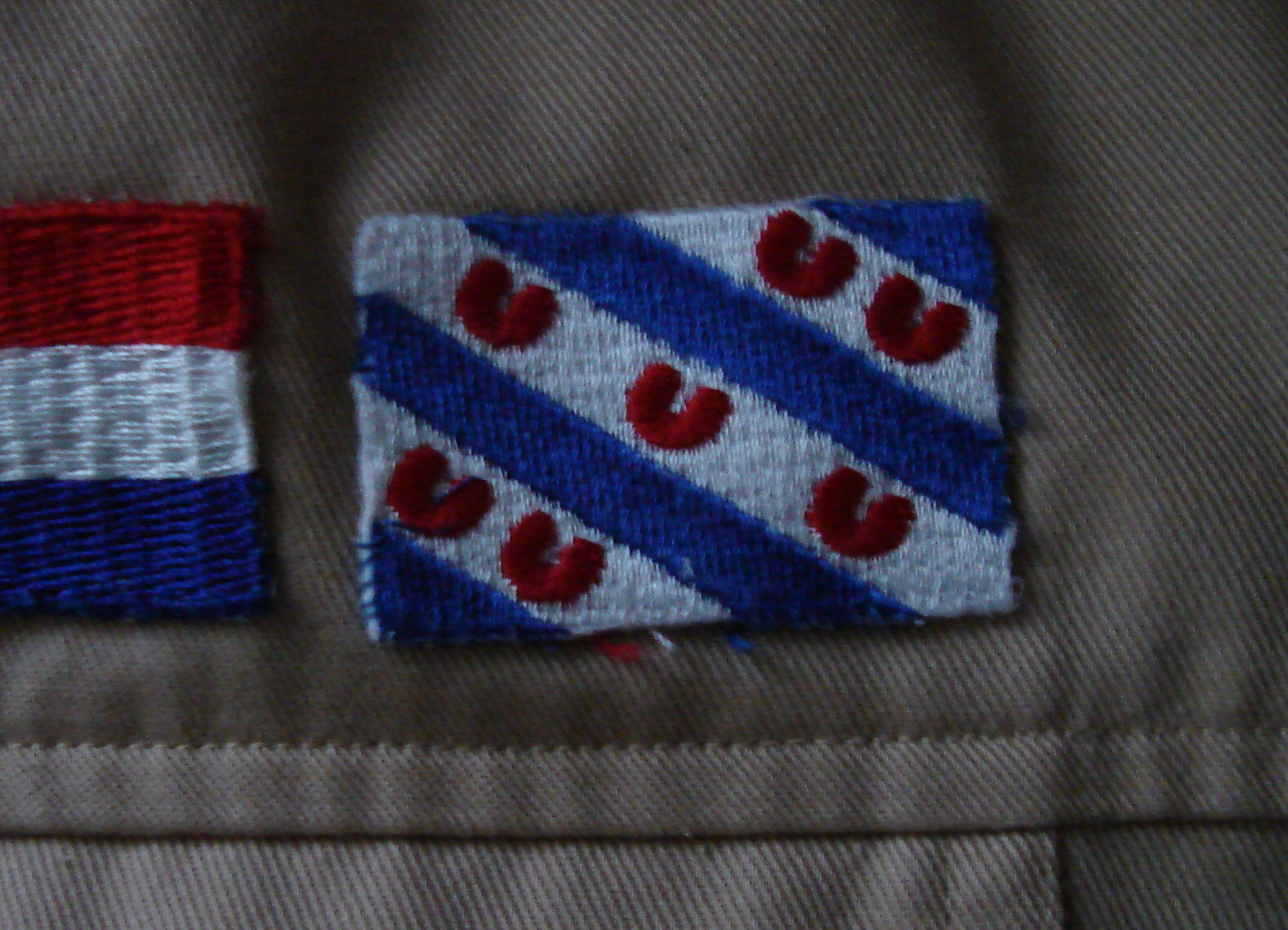 Ynsynje yn foarm fan Fryske flagge op it Skoutingunifoarm Fryske Skout.